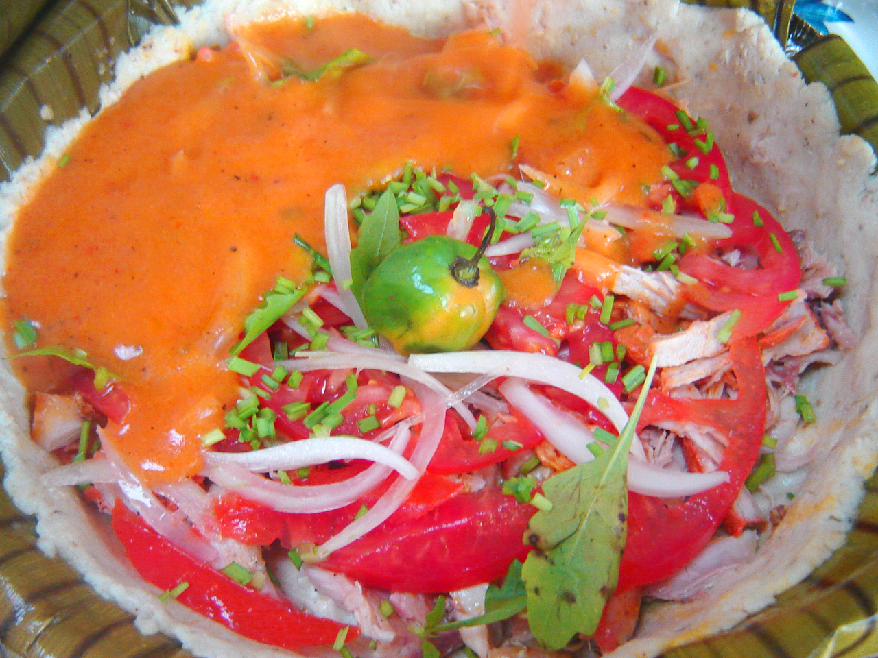 foto de un pibipollo antes de ponerle su tapa